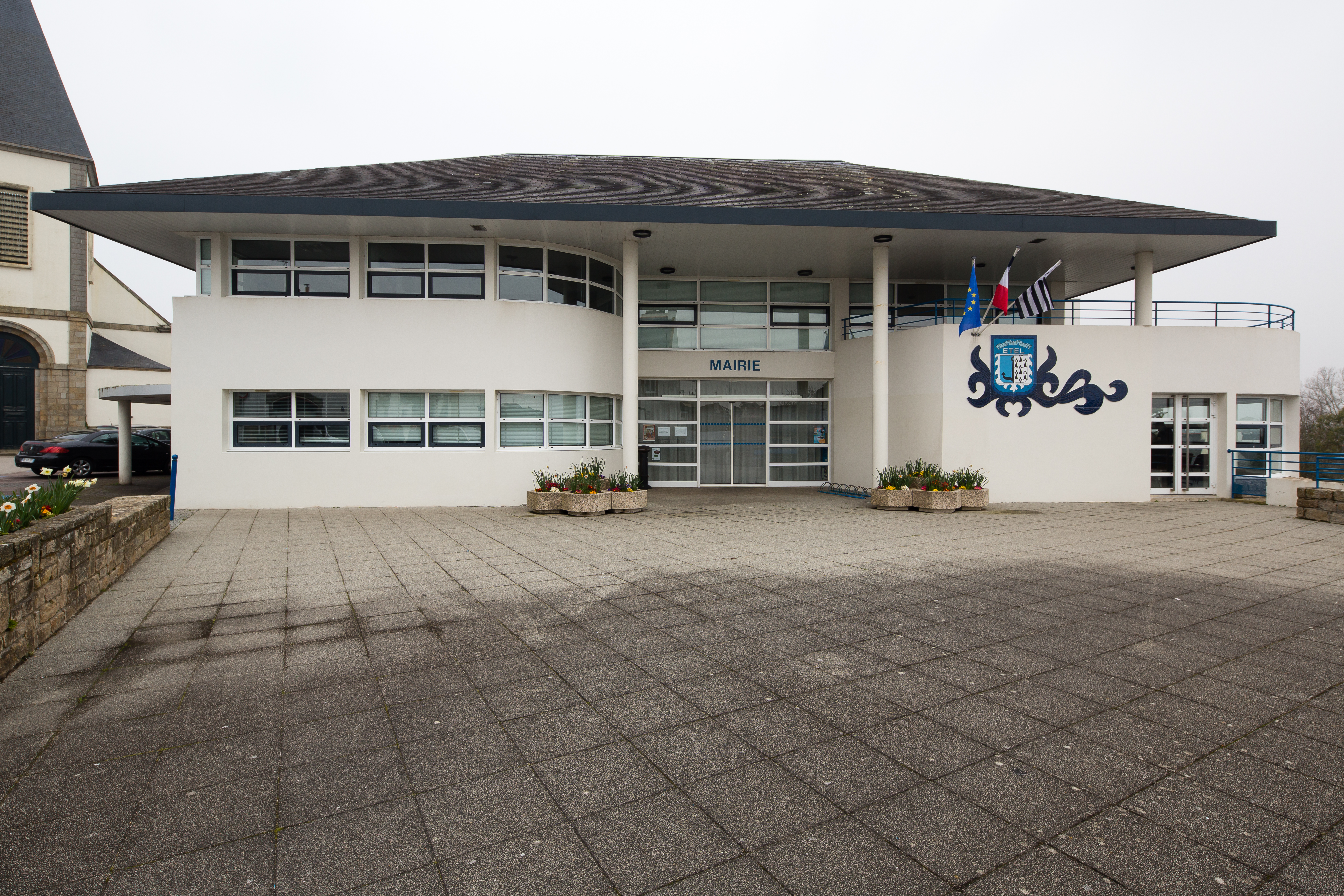 Parvis et façade de la mairie d'Étel (France)